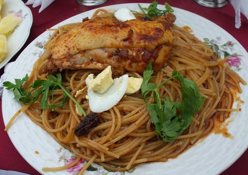 Plato típico